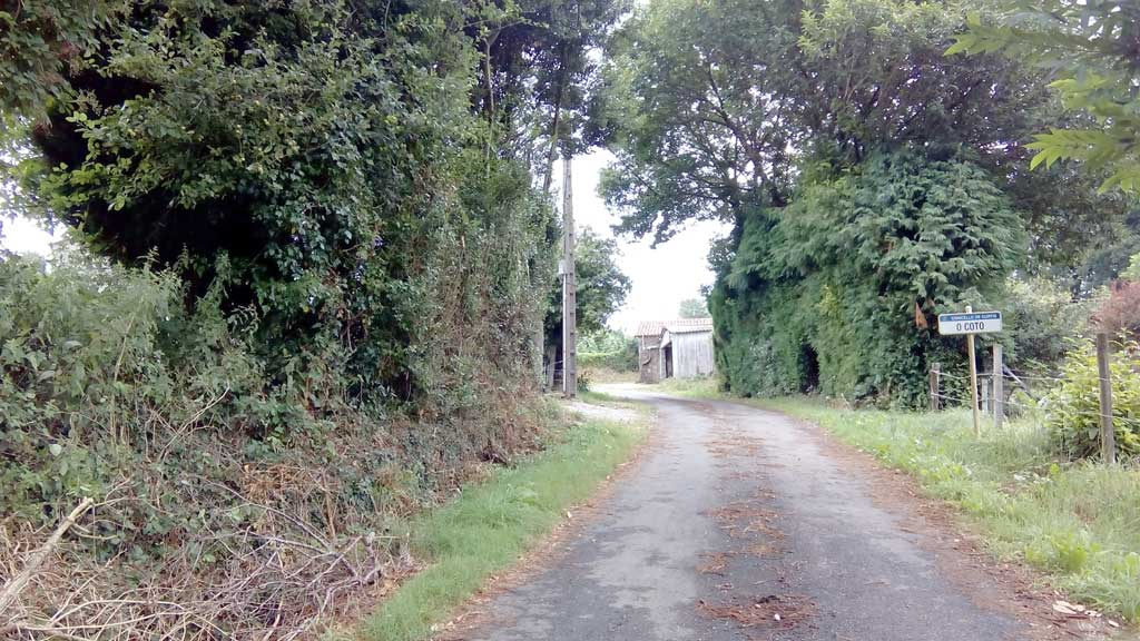 Vista do Coto, Curtis.